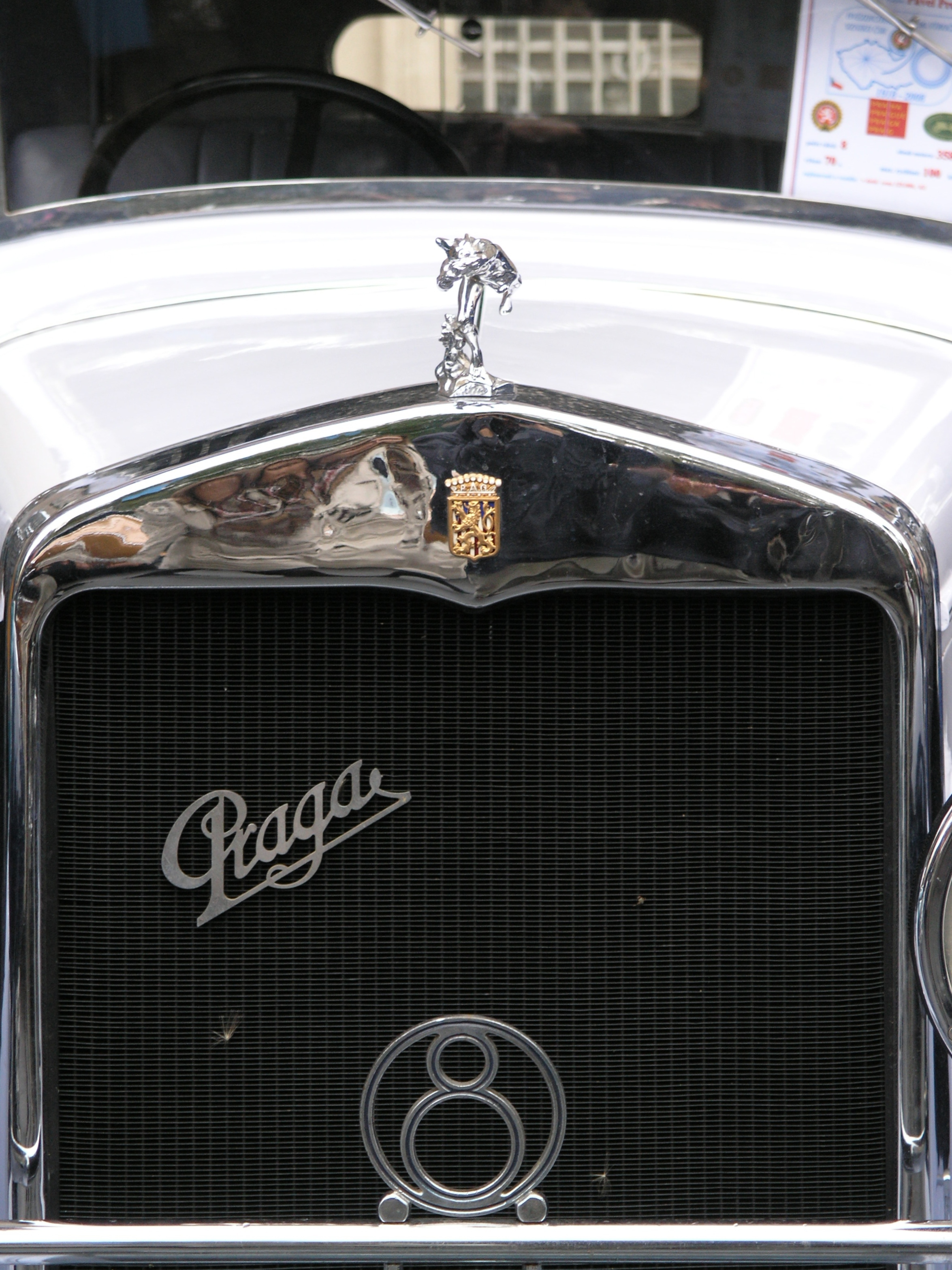 Vůz Praga Grand (1929) účastnící se jízdy veteránů u příležitosti 90. výročí vzniku samostatného Československa, 28. října 2008